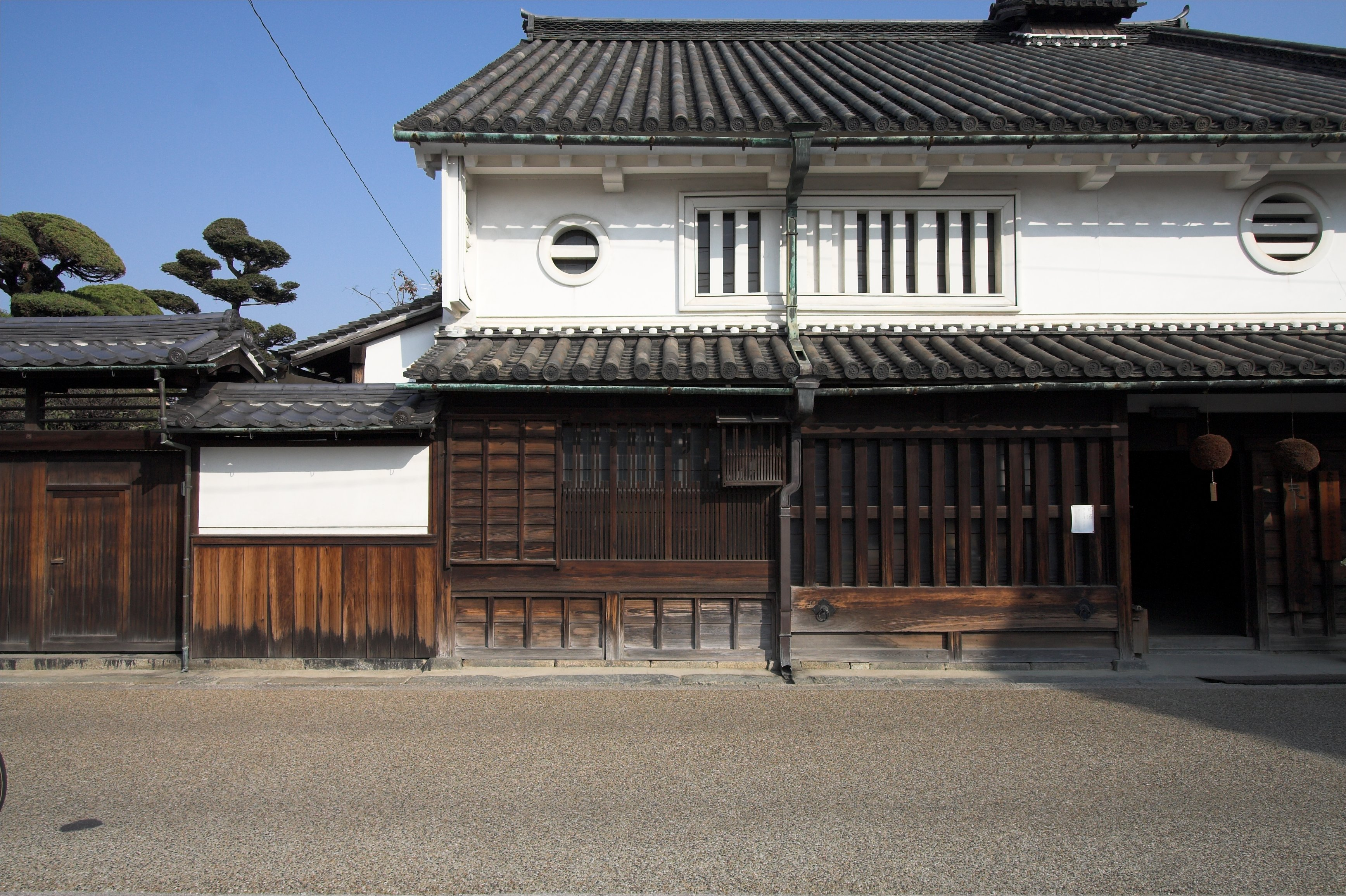 河合家住宅(奈良県橿原市, Japan)